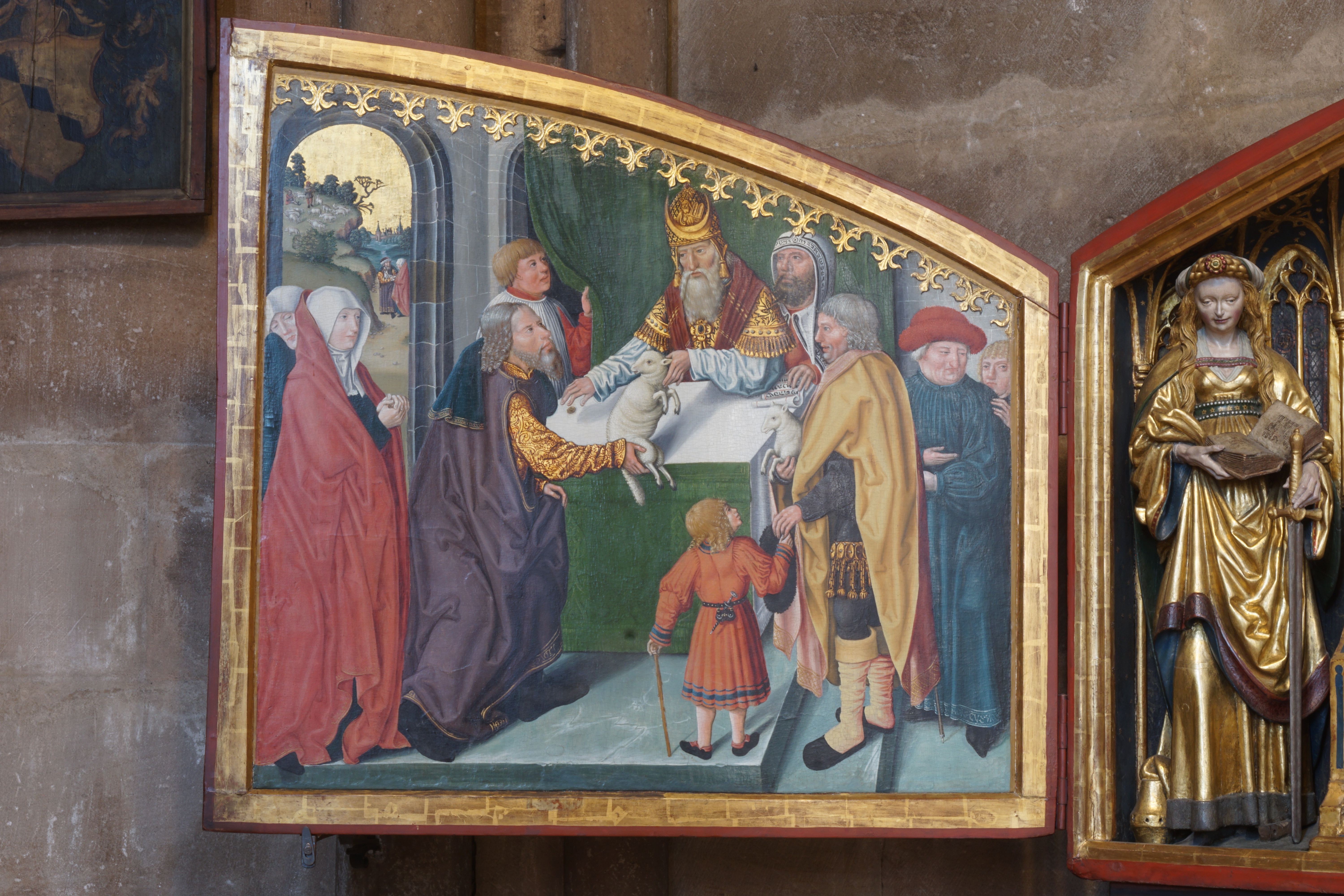 Siehe Dateiname